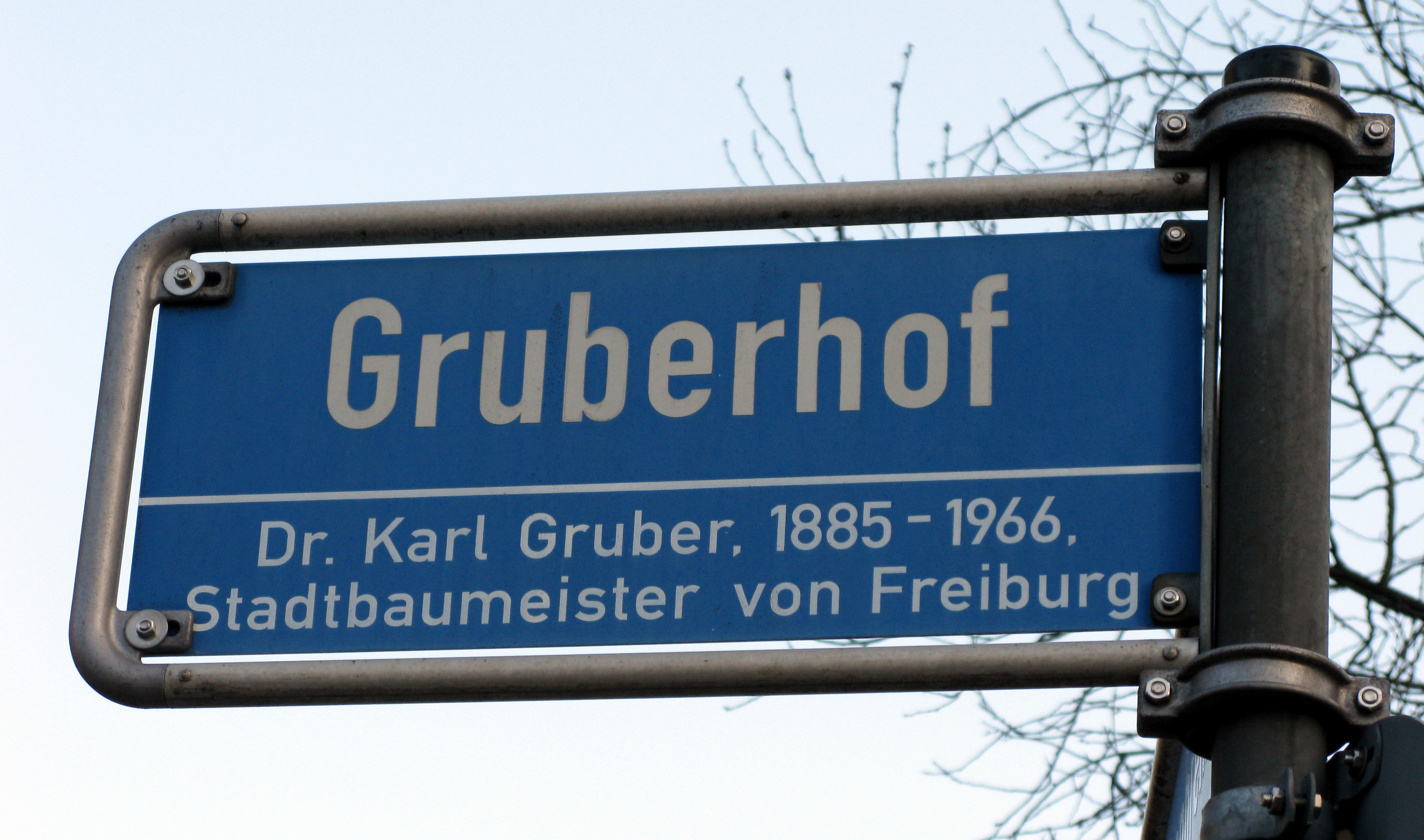 Nach Dr. Karl Gruber benannte Straße im Freiburger Stadtteil Betzenhausen